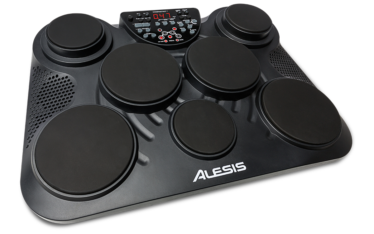 Alesis CompactKit7 elektrooniline trummikomplekt